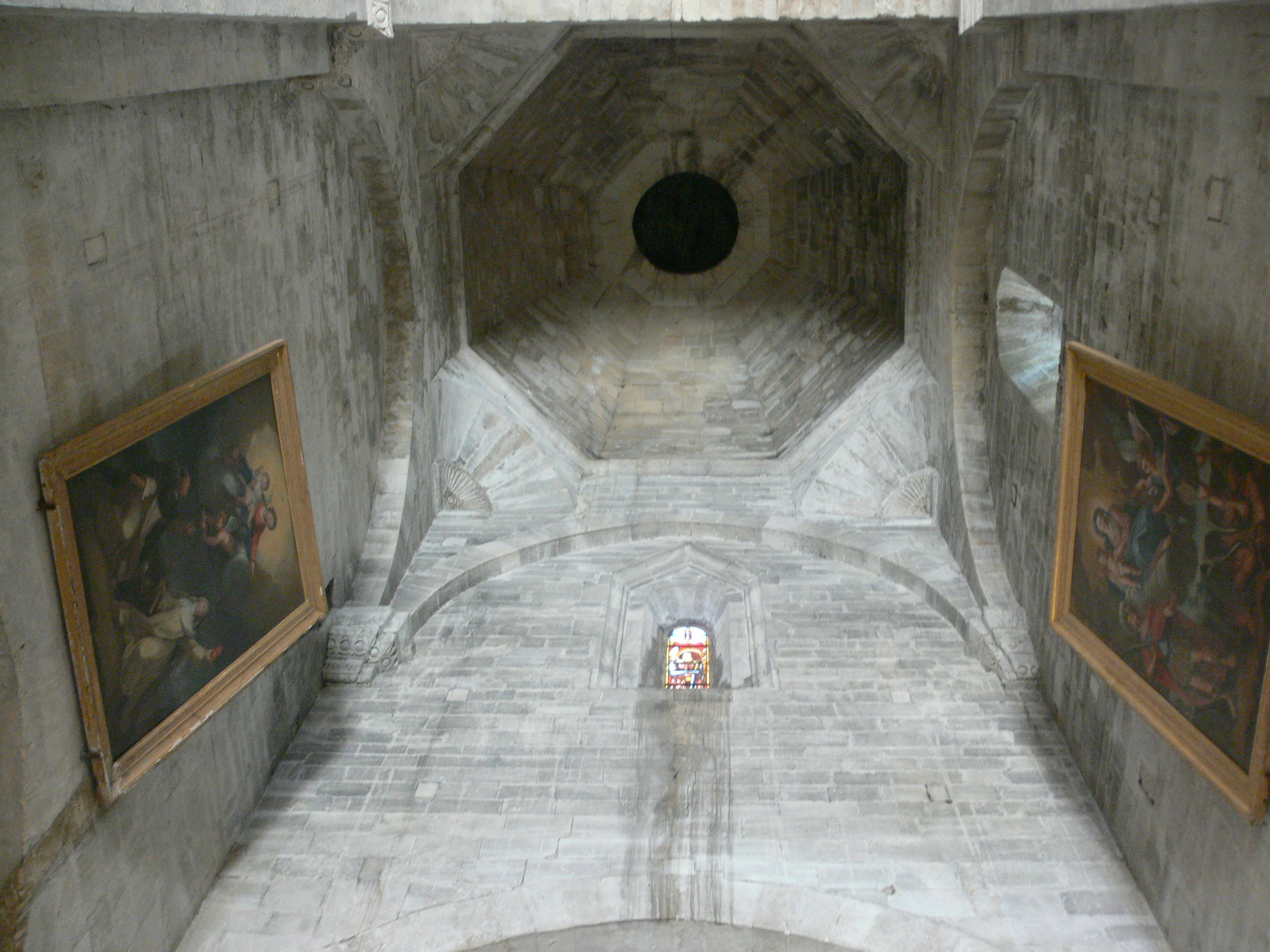 La Garde-Adhémar - église Saint-Michel